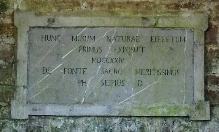 Bad Pyrmont, Dunsthöhle, Inschrifttafel:HUNC MIRUM NATURAE EFFECTUMPRIMUS EXPOSUITMDCCXXIVDE FONTE SACRO MERITISSIMUSPH SEIPIUS D„Diese erstaunliche Wirkung der Naturstellte als Erster aus1724der um den heiligen Born höchst verdienteDr. Philipp Seip.“